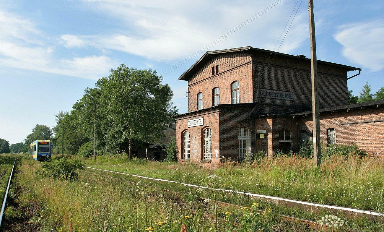 Budova nádraží v Dobroszowicích (v roce 2005), Polsko